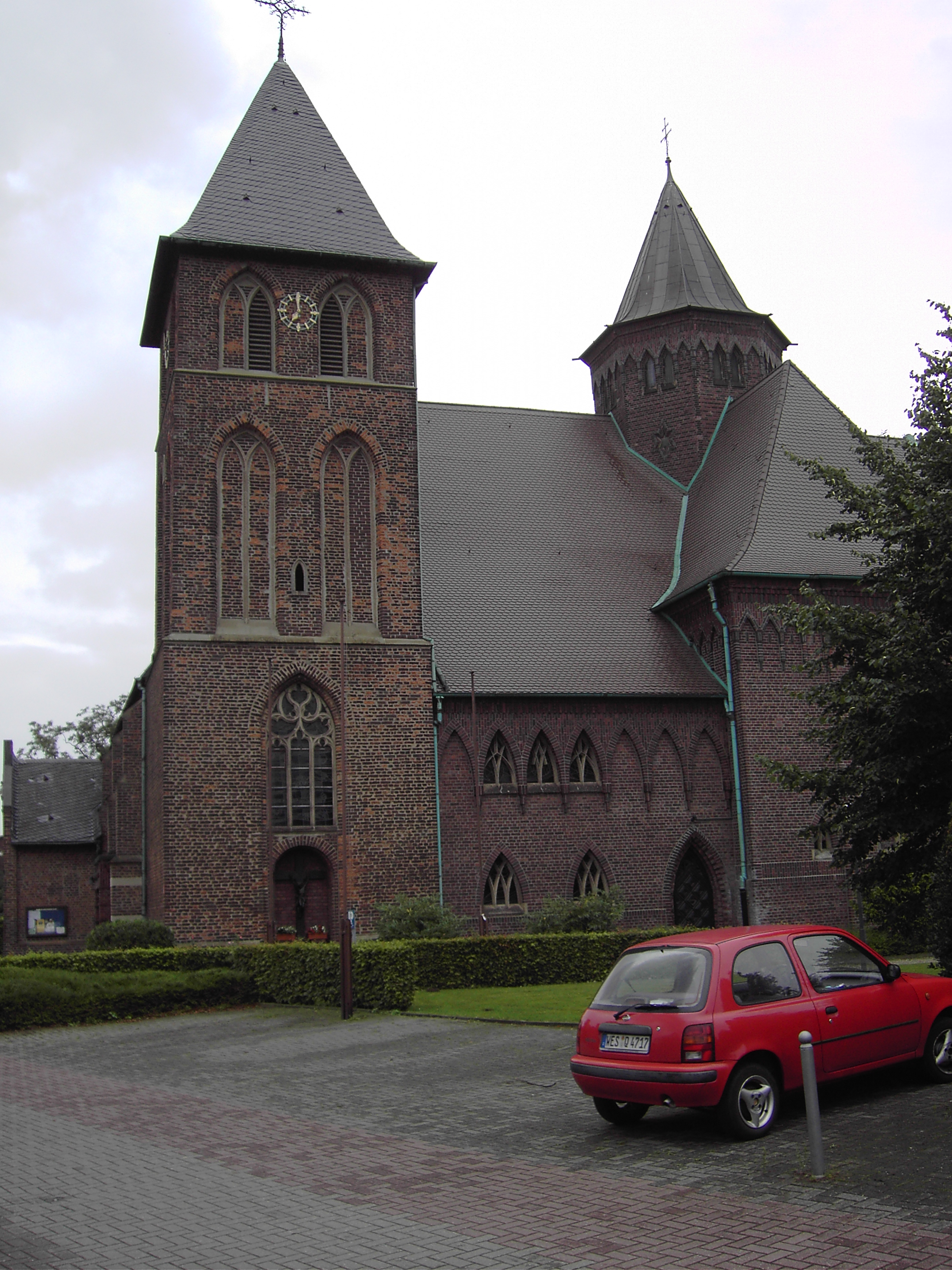 St.-Johannes-Kirche Eppinghoven: Kirchturm und Erweiterungsbau aus den 1920er Jahren